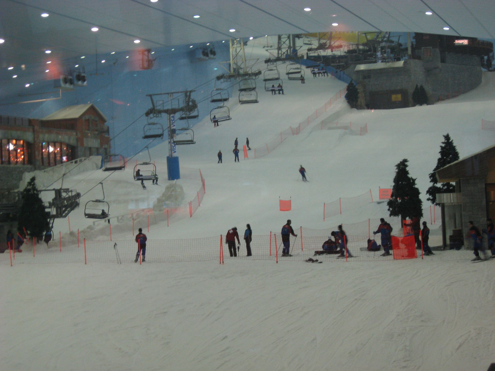 Ski Dubai Chairlift